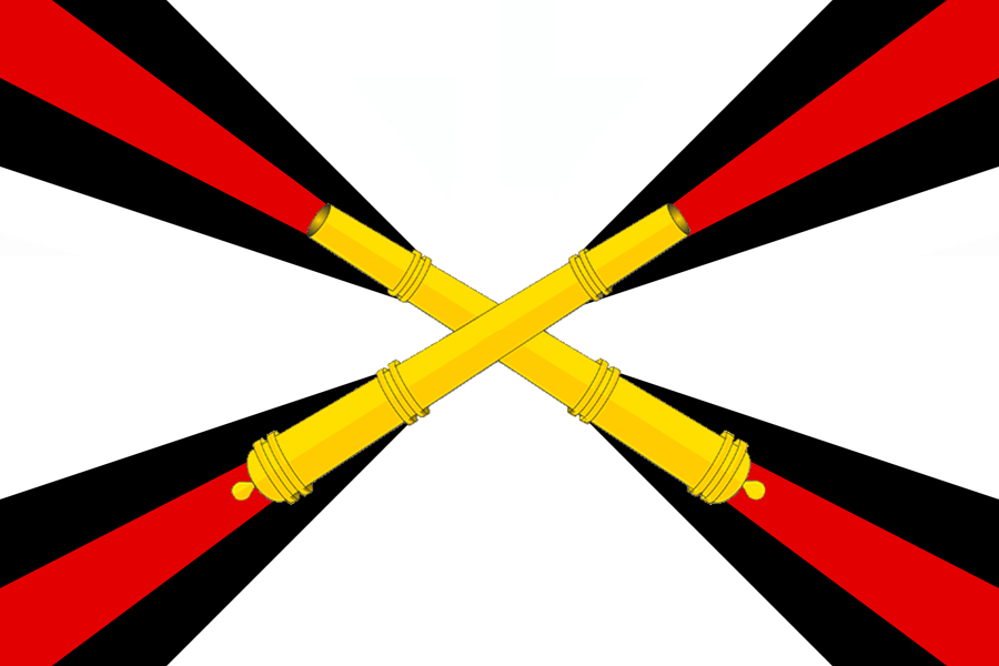 Флаг ракетных войск и артиллерии, Россия